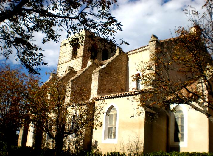 Église Saint-Baudile à Siran (Hérault)